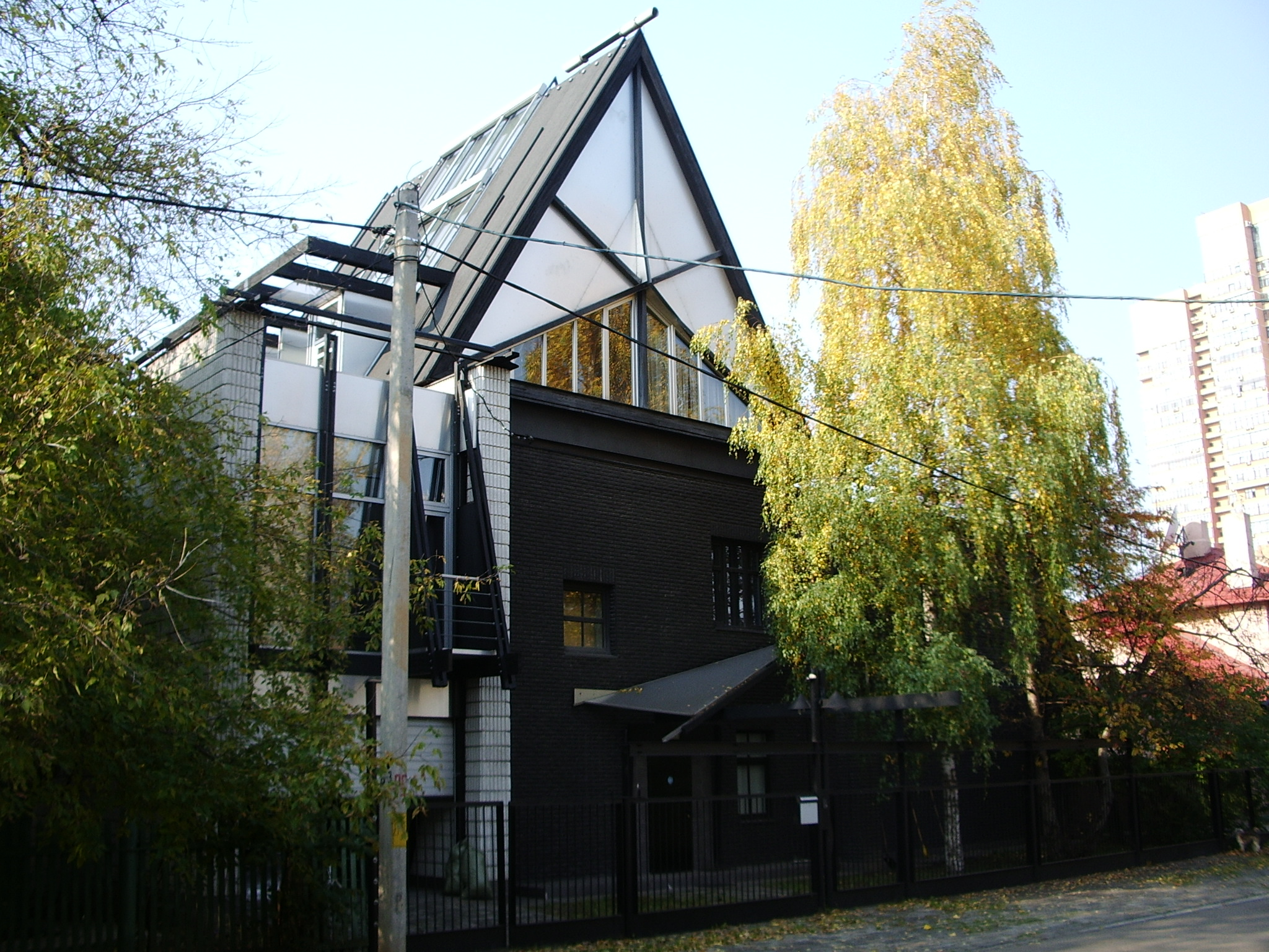 Улица Саврасова, дом 7. Посёлок "Сокол" в Москве.